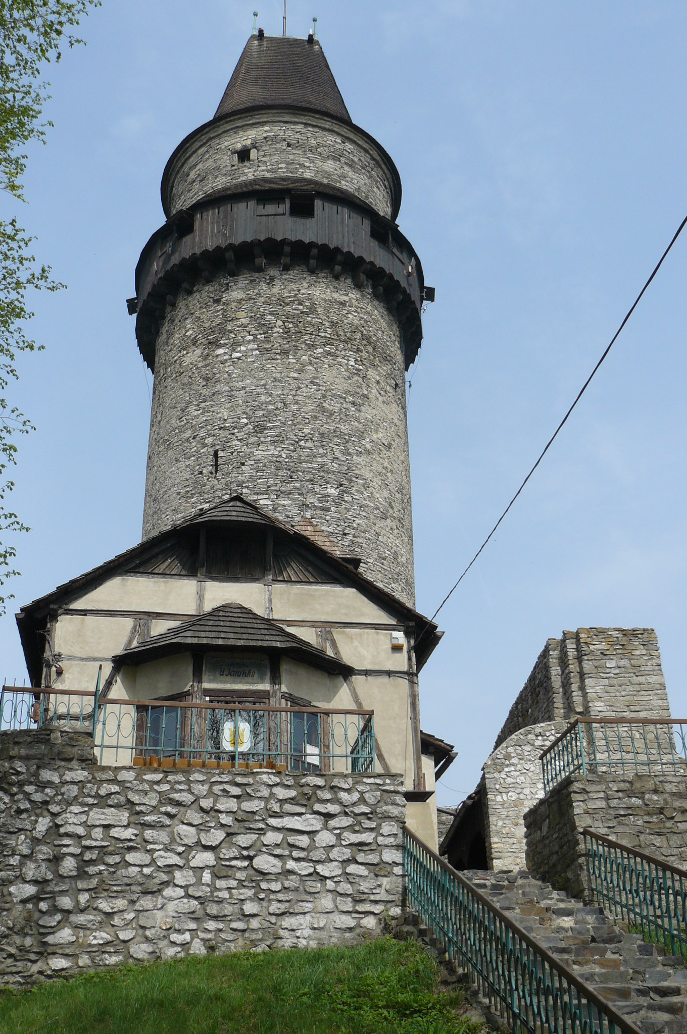 Wieża Truba w Stramberku.